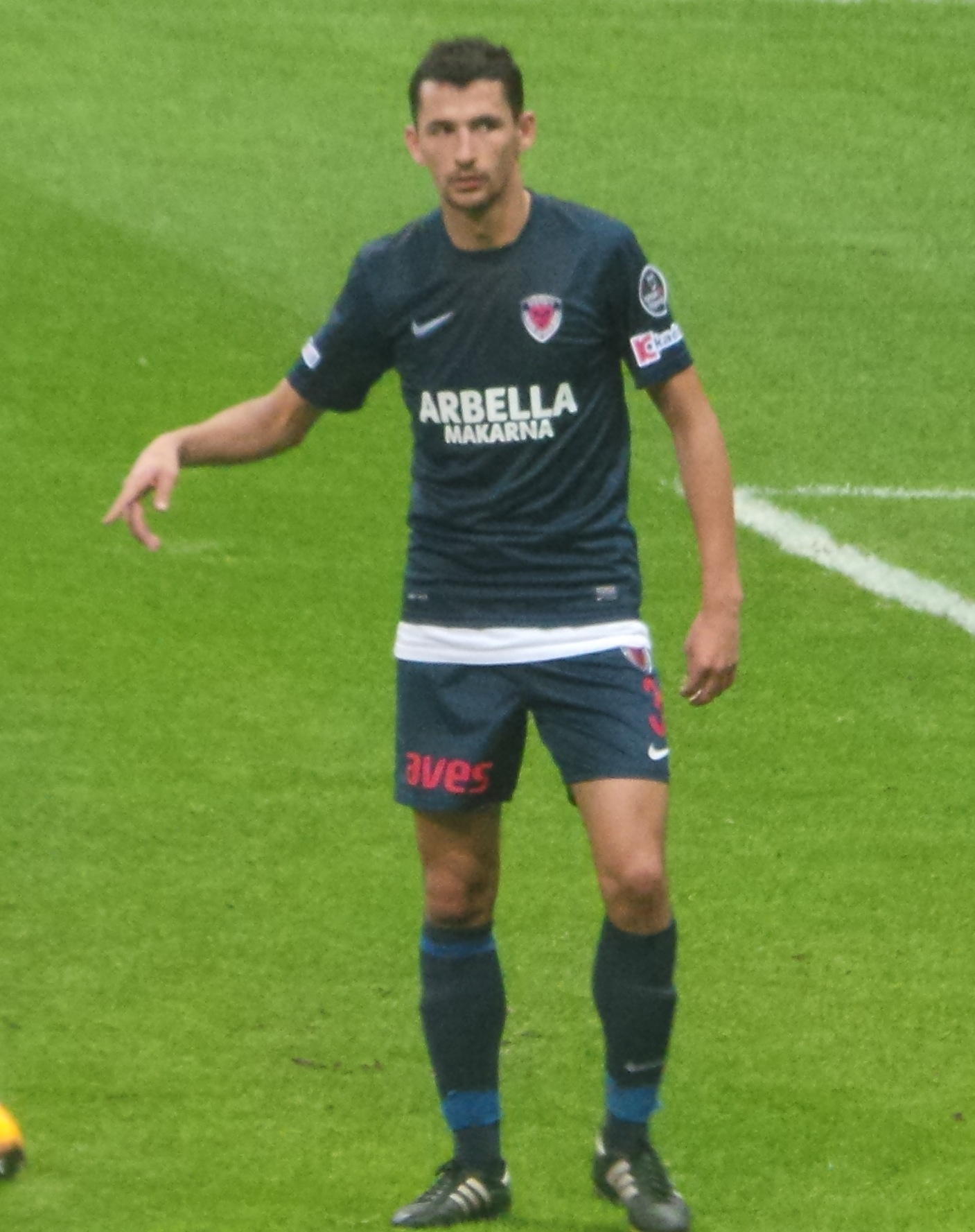 Loret Sadiku